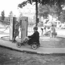 Bundesgartenschau 1957 in Köln - Autobahn im Kindergarten